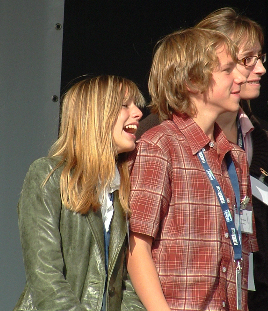 Margot De Ridder tijdens Flikkendag 2005 op 25 september 2005 in Gent (België).